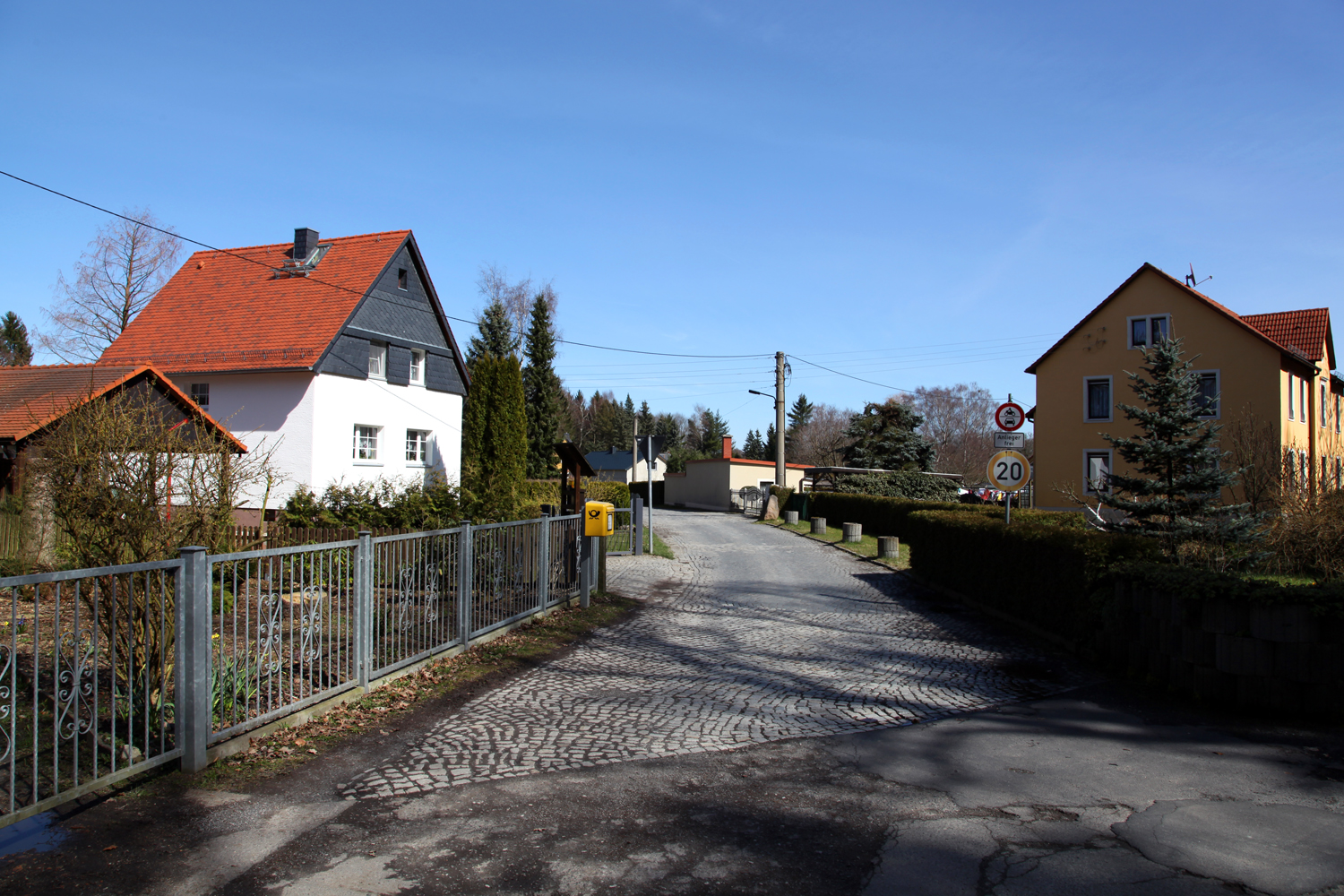 Die Siedlung Heidehäuser in Radeberg, Sachsen